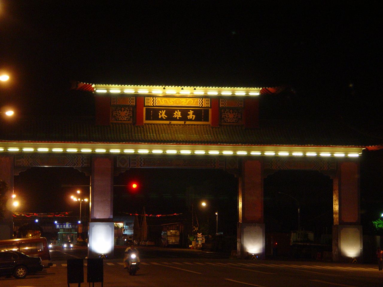 高雄港大門 阿仁拍攝 時間：2005年6月30日